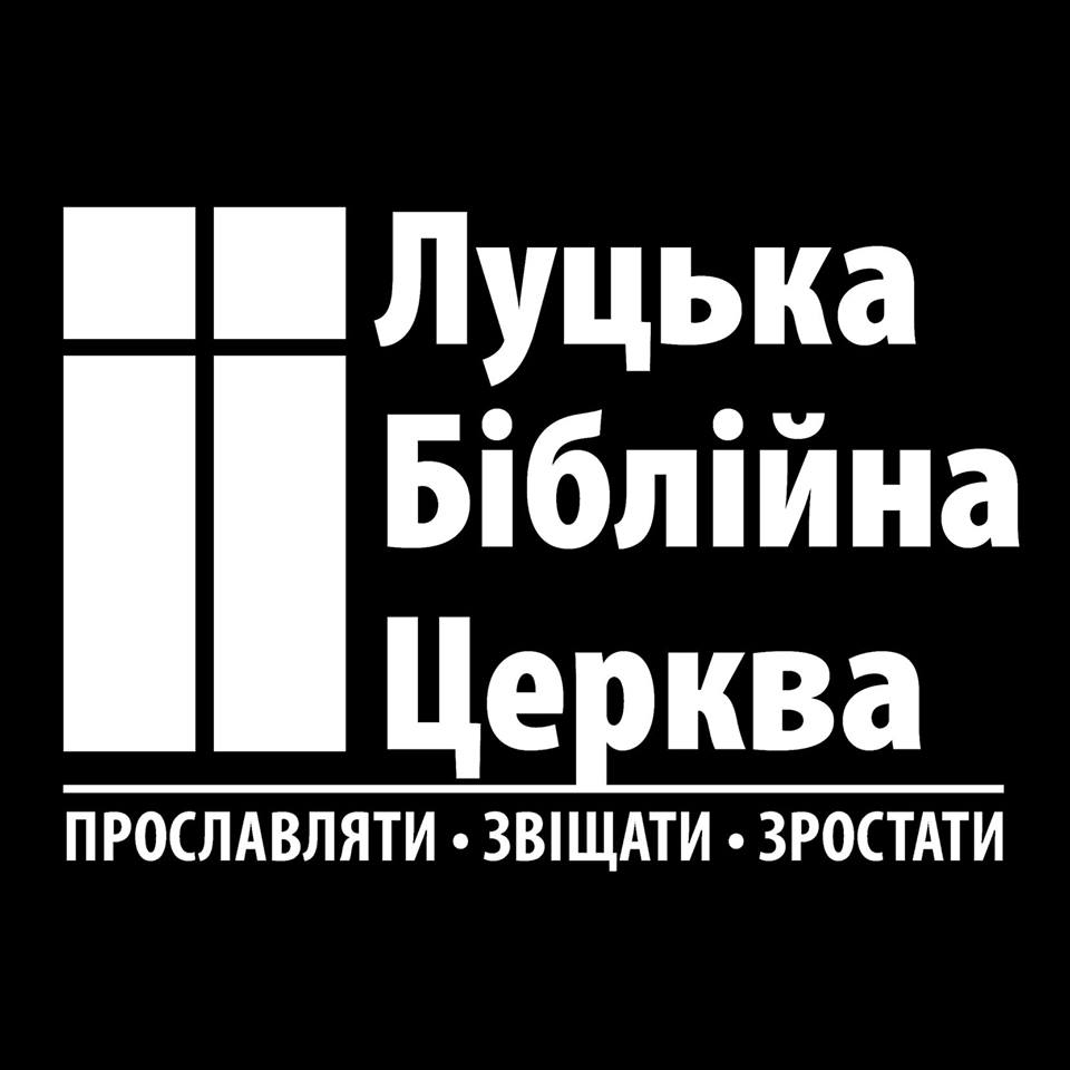 Логотип